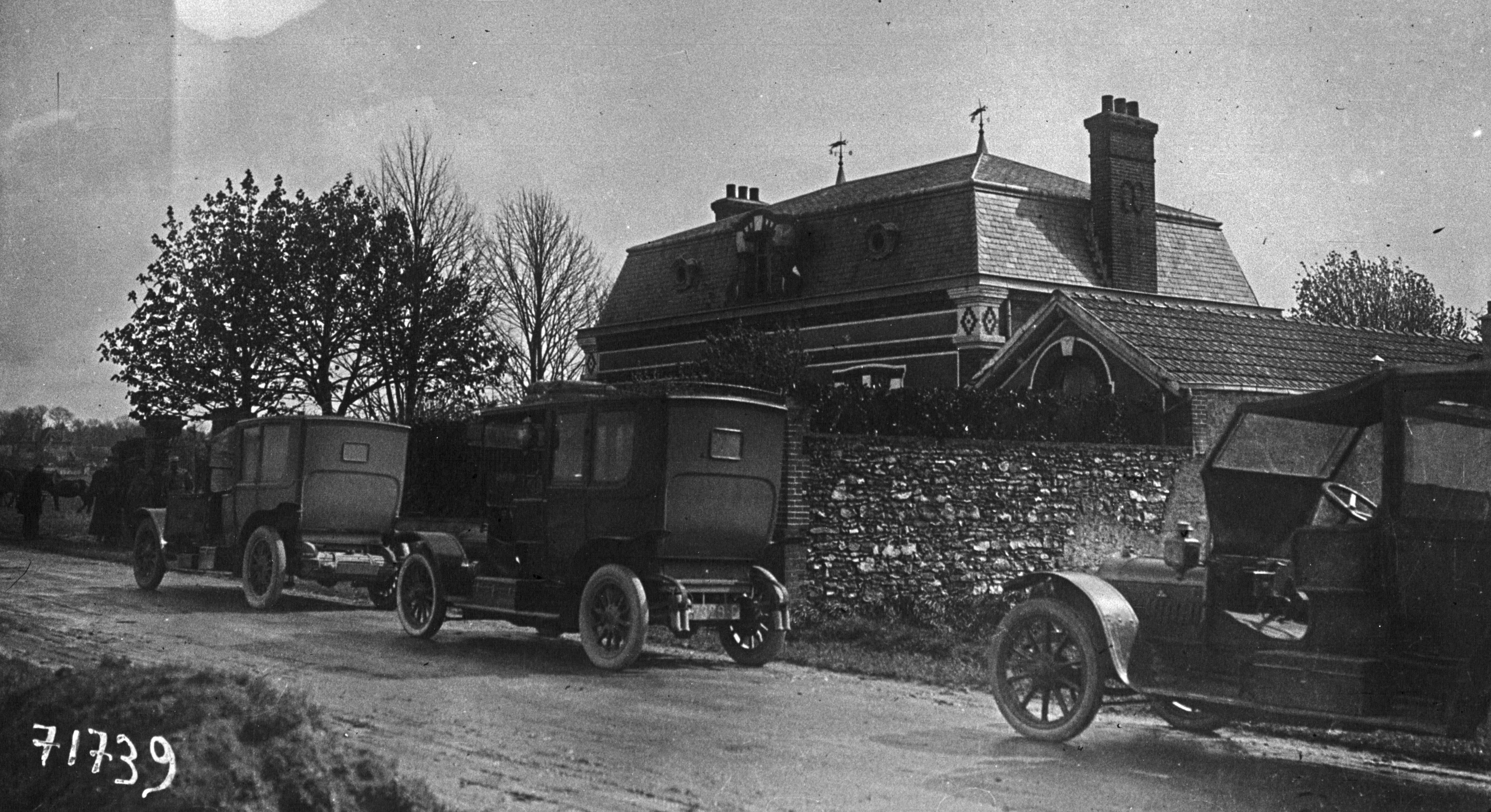 « L'affaire Landru, perquisition de la villa de Gambais (avril 1919) : les voitures de la police stationnées devant la villa. »